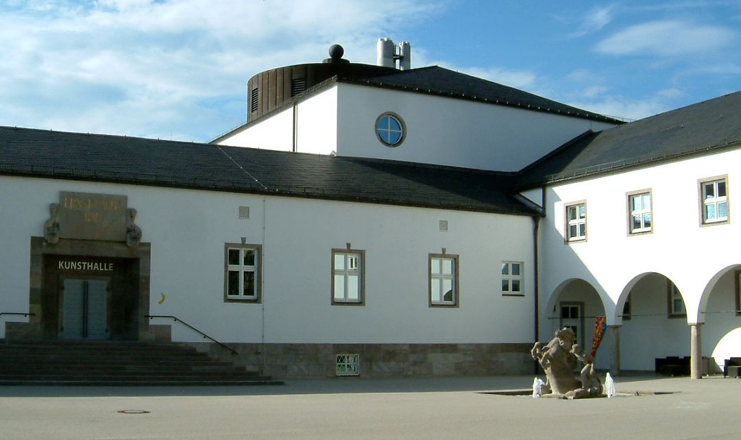 Kunsthalle Schweinfurt, Haupteingang mit Brunnen